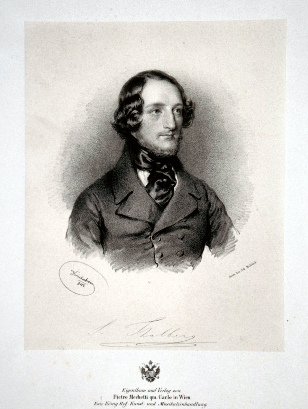 Sigismund Thalberg (1812-1871),österreichischer Pianist und Komponist Lithographie von Josef Kriehuber, 1842